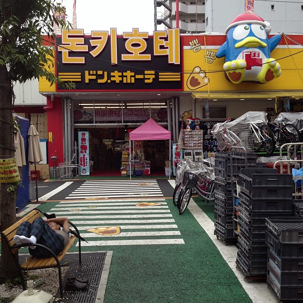 新宿店 (新宿区大久保1)